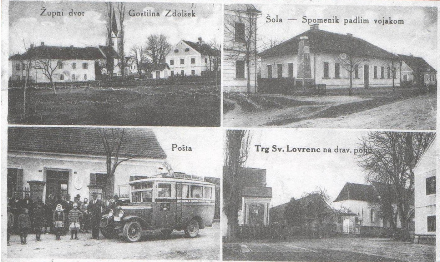 Razglednica Sv. Lovrenca